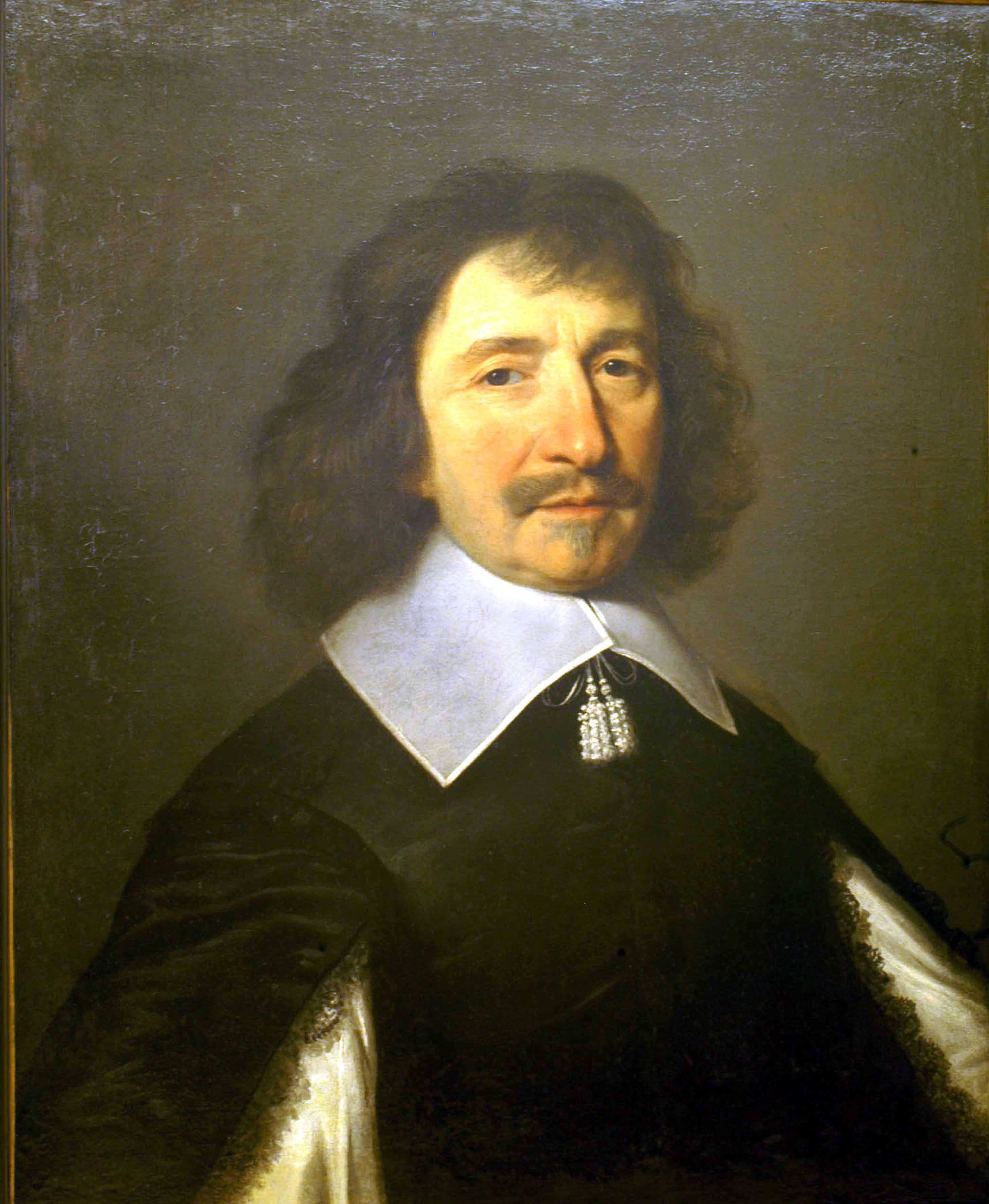 Portrait of Vincent Voiture (1597-1648)